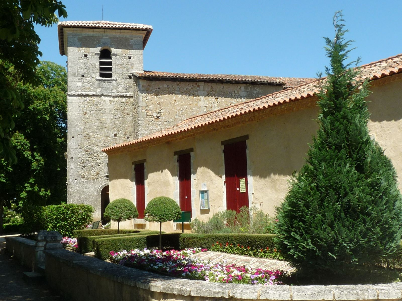 église de Parcoul, Dordogne, France